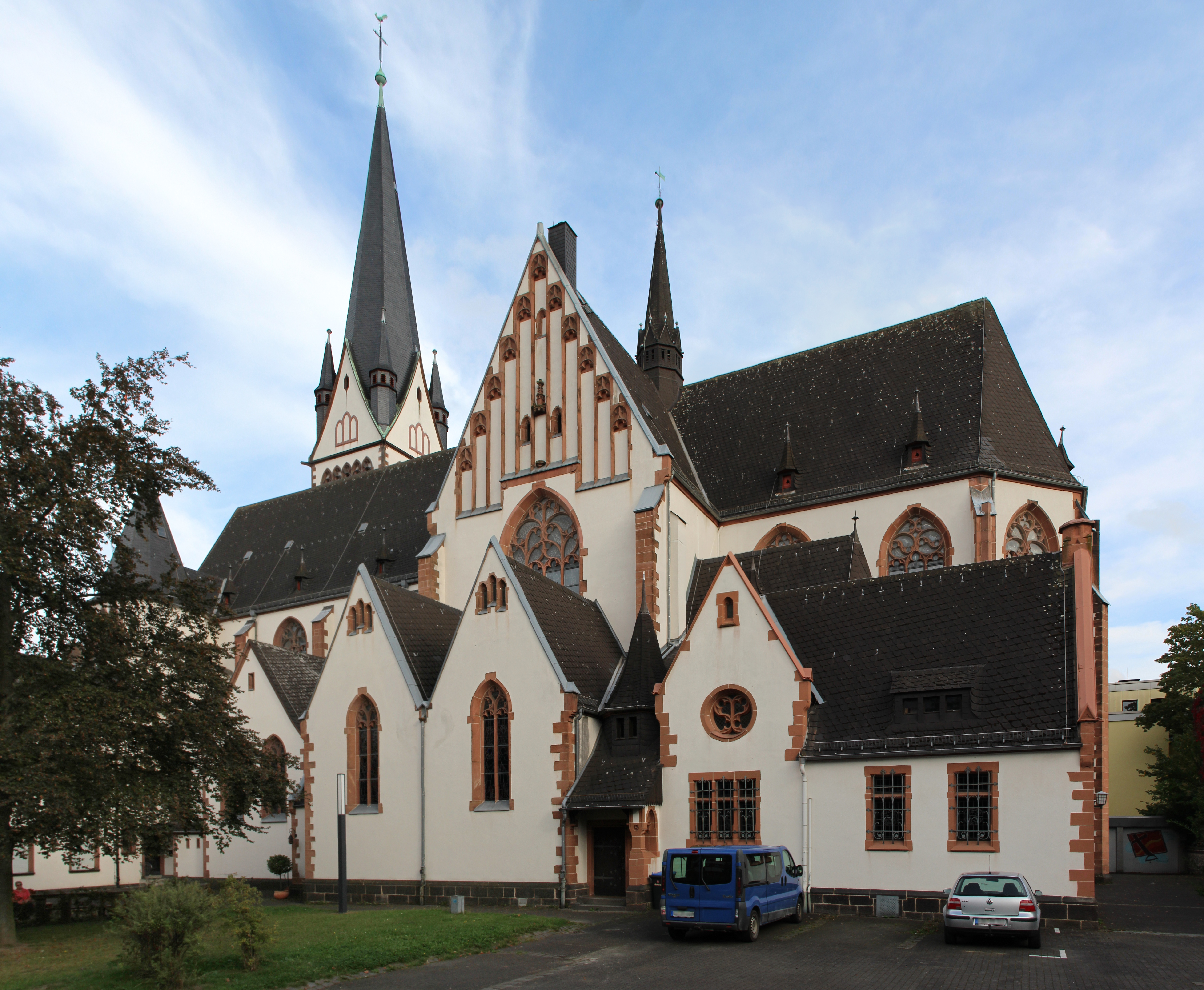 St. Bonifatius Kirche